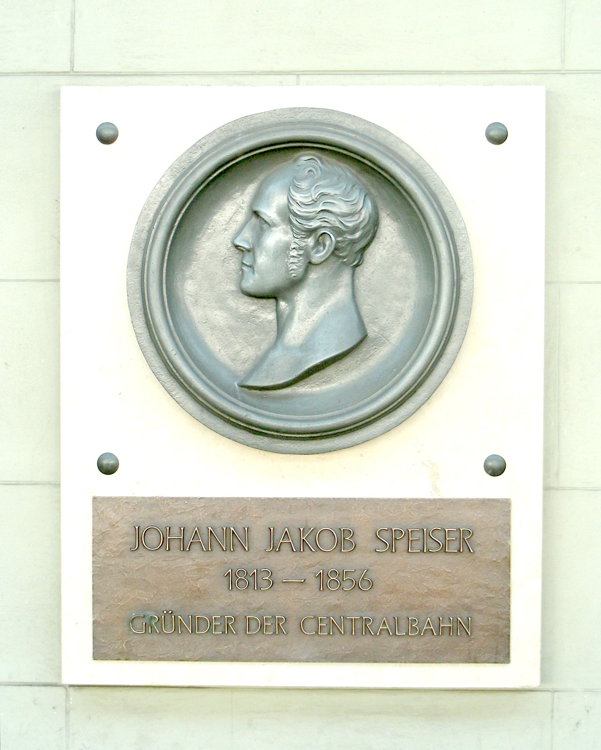 Johan Jakob Speiser, Gründer der Centralbahn, Gedenktafel im Bahnhof Olten